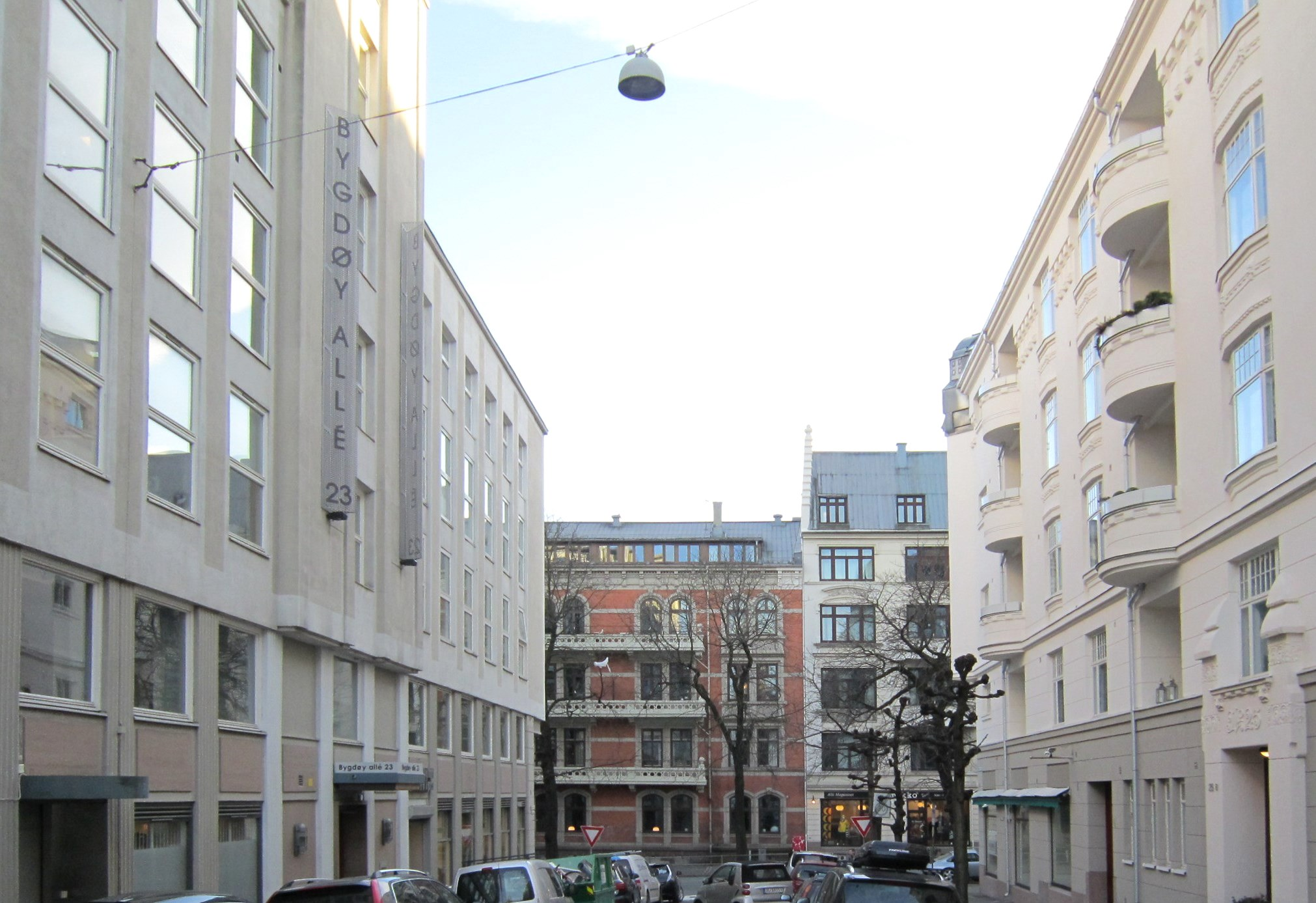 Lambrechts' gate på Frogner i Oslo